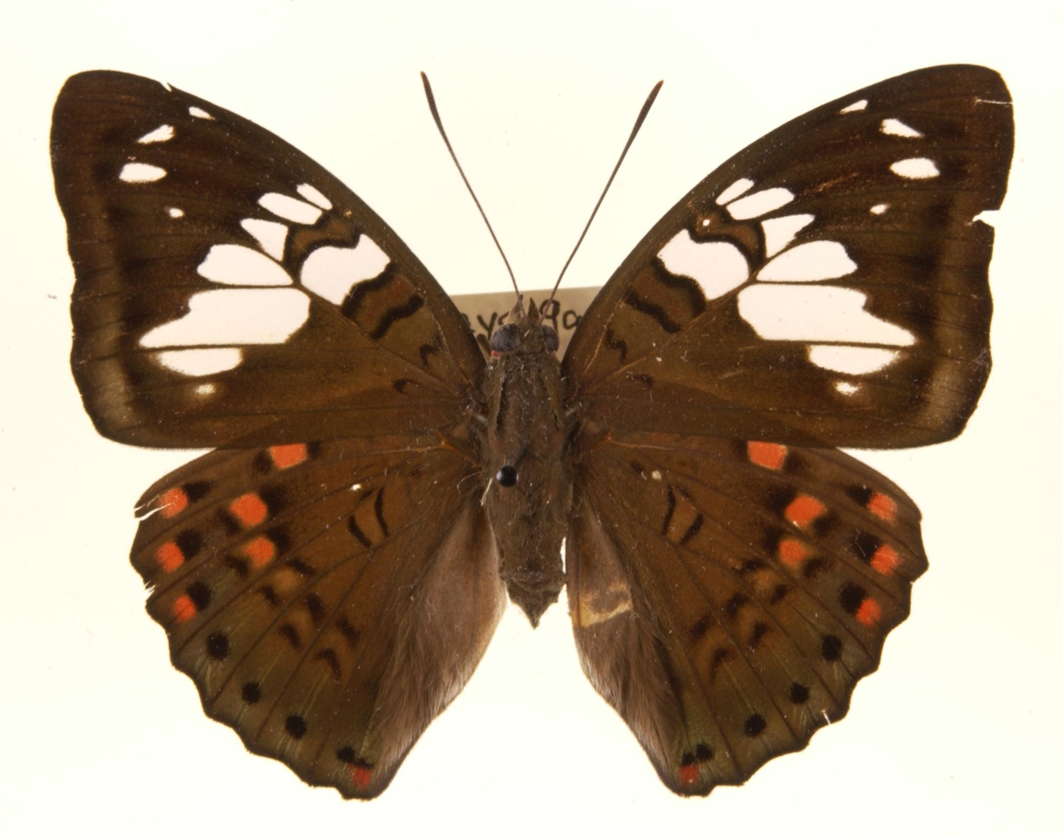 Euthalia malaccana Malaya Own photograph Nikon